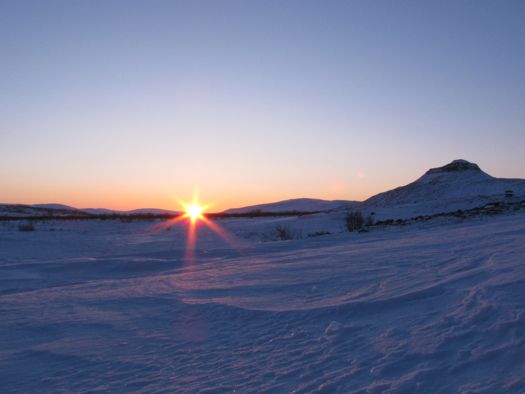 auringonnousu Meekolla maaliskuussa